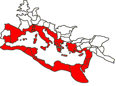 bron: File:REmpire-blank.png Bewerking Commons plaatje.